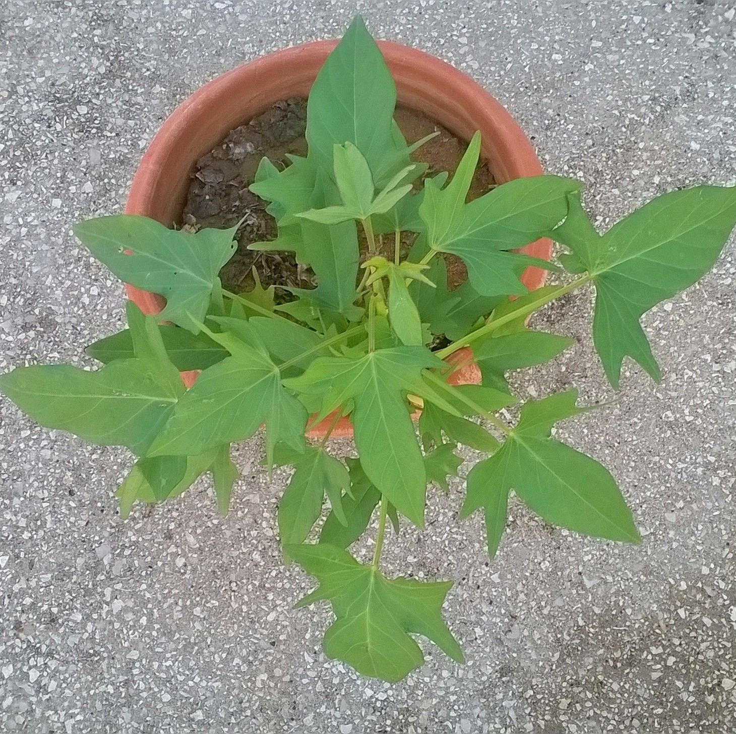 Բաթաթը ծաղկամանում